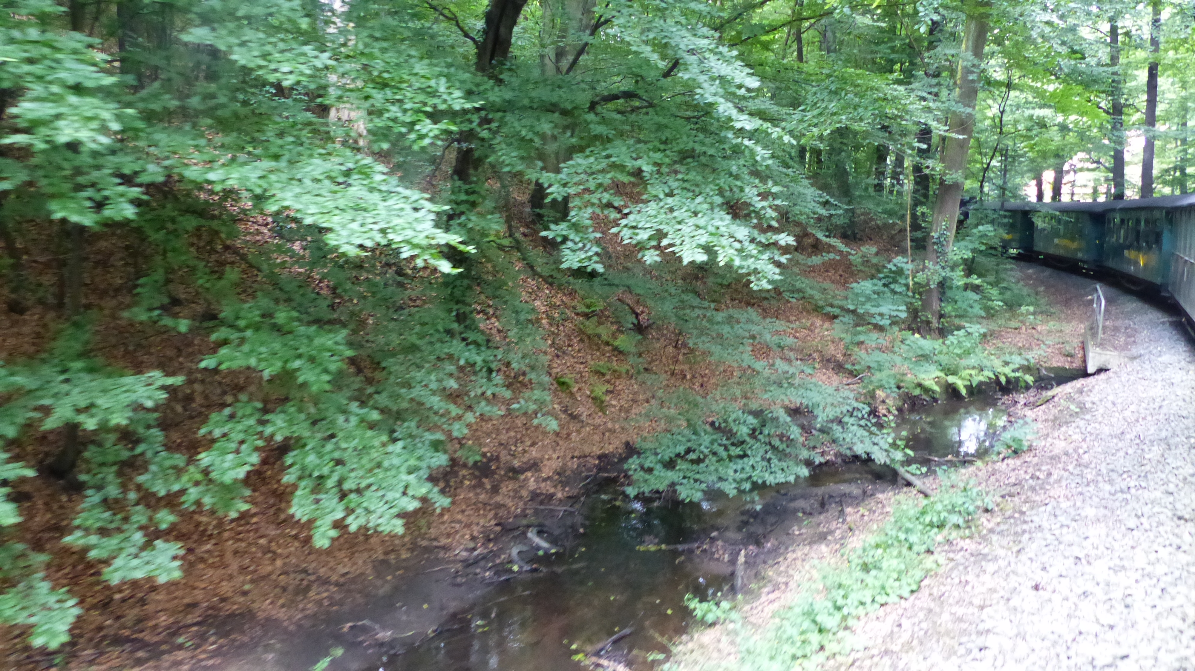 Lößnitzgrund im Landschaftsschutzgebiet Friedewald, Moritzburger Teichgebiet und Lößnitz